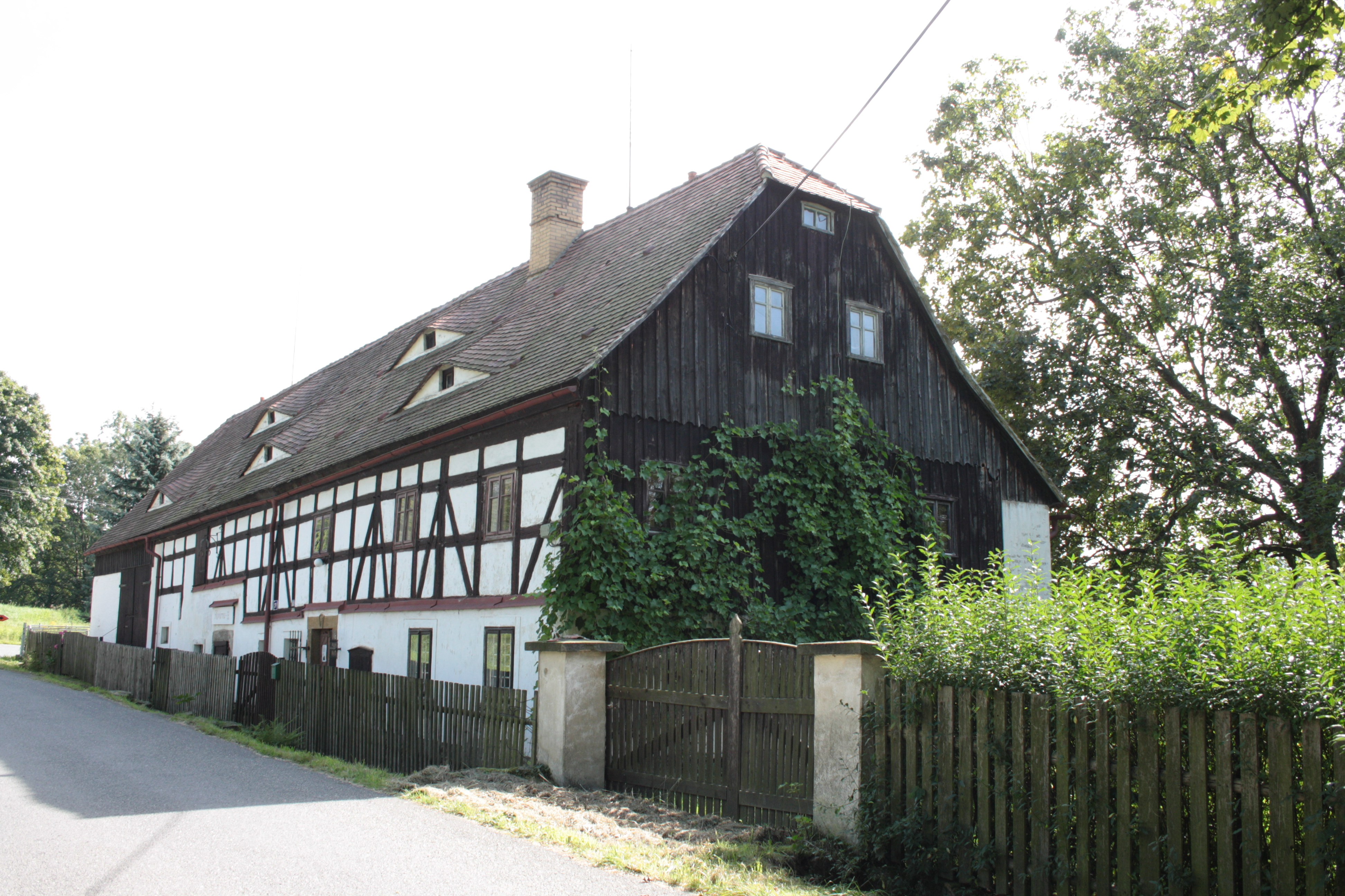 This photograph was taken with a DSLR from WMCZ's Camera grant. Pohled od západu na (Stelzigovu) kovárnu v Dolní Řasnici (dům číslo popisné 27).